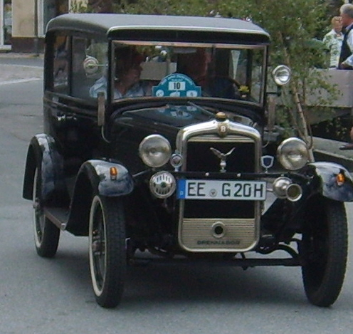 Oldtimerrallye Elsterwerda am 19. Juni 2011